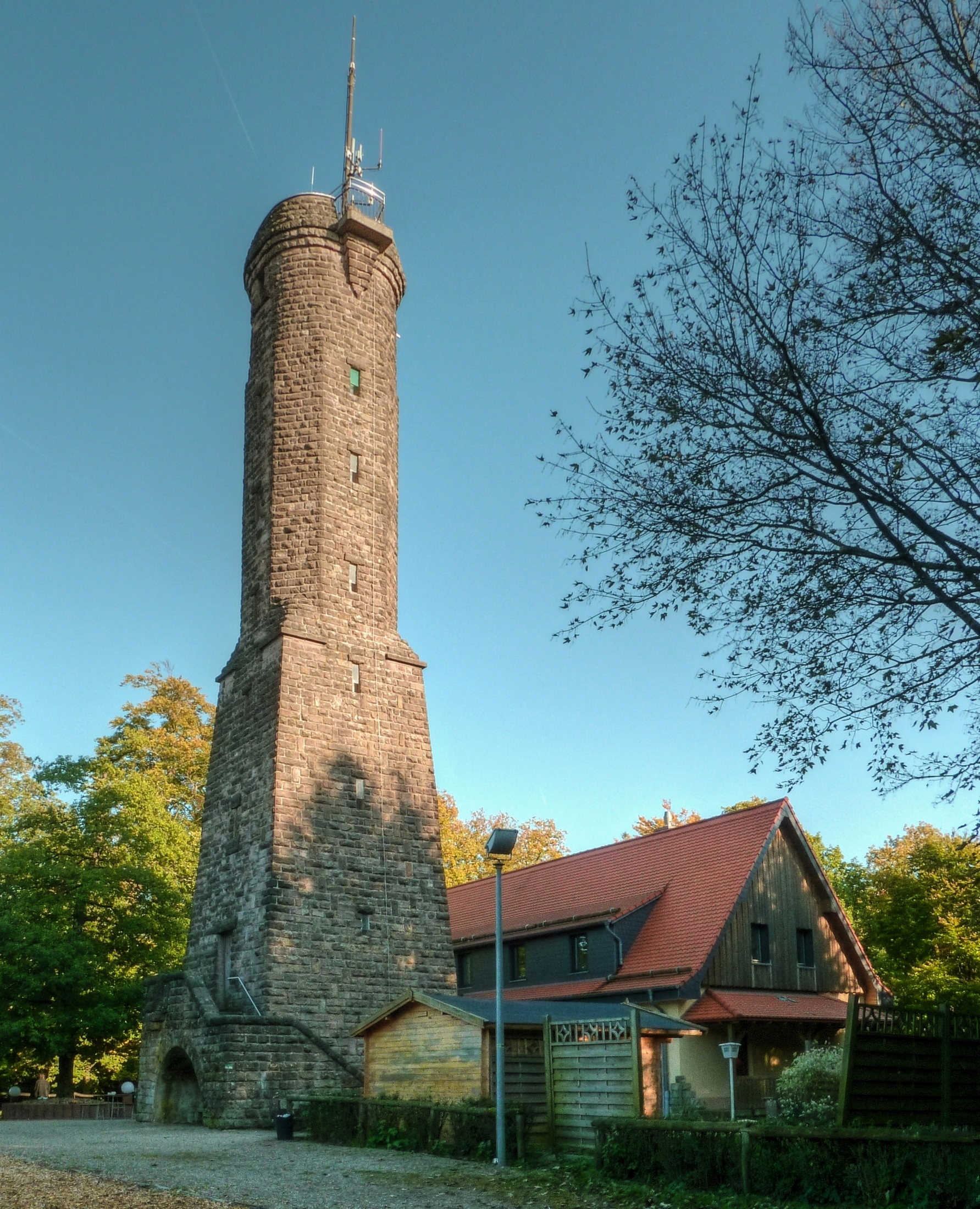 Der Höcherbergturm und das Höcherberghaus am Turm (Restaurant).